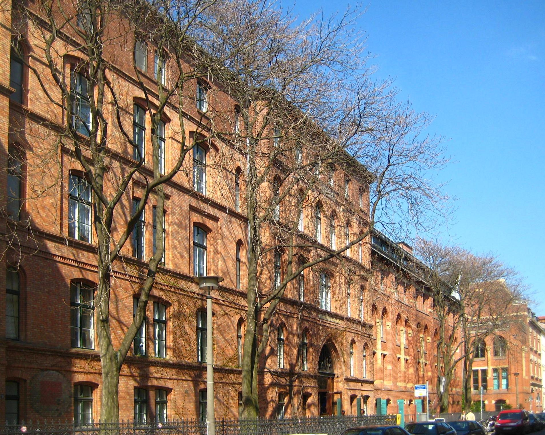 Die drei Vorderhäuser des St. Hedwigs-Krankenhauses in der Großen Hamburger Straße 5-11 in Berlin-Mitte. Das südliche Vorderhaus (links) entstand 1879-1881 nach einem Entwurf des Architekten Vincenz Statz; der mittlere Josephsbau, 1904-1905 errichtet, stammt von Carl Moritz; das nördlich anschließende Elisabethhaus wurde 1886-1889 nach einem Entwurf von Max Hasak erbaut. Weitere Gebäude auf dem weitläufigen Gelände des Krankenhauses entstanden zwischen 1851 und 1937. Das St. Hedwigs-Krankenhaus ist als Gesamtanlage denkmalgeschützt.Unknown the three front buildings of the st. hedwig hospital at große hamburger straße no. 5-11 in berlin. the south front building (on the left) was constructed 1879-1881 to a design by vincenz statz; the middle josephsbau was built 1904-1905 by carl moritz; the elisabethhaus to its north is by max hasak and was built 1886-1889. other buildings on the large date from 1851 to1937. the whole complex of the st. hedwig hospital has been designated a historic landmark.